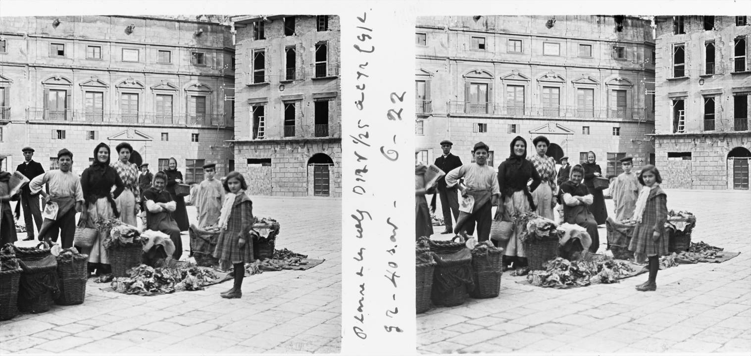 Plaça de l'Ajuntament a Reus. Josep Salvany i Blanch (1911)